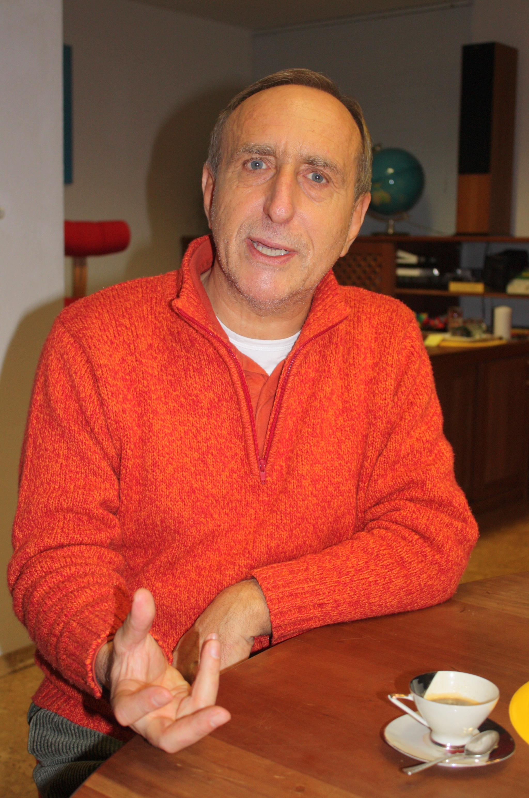 Hans Kreis, Fachbuch-Autor